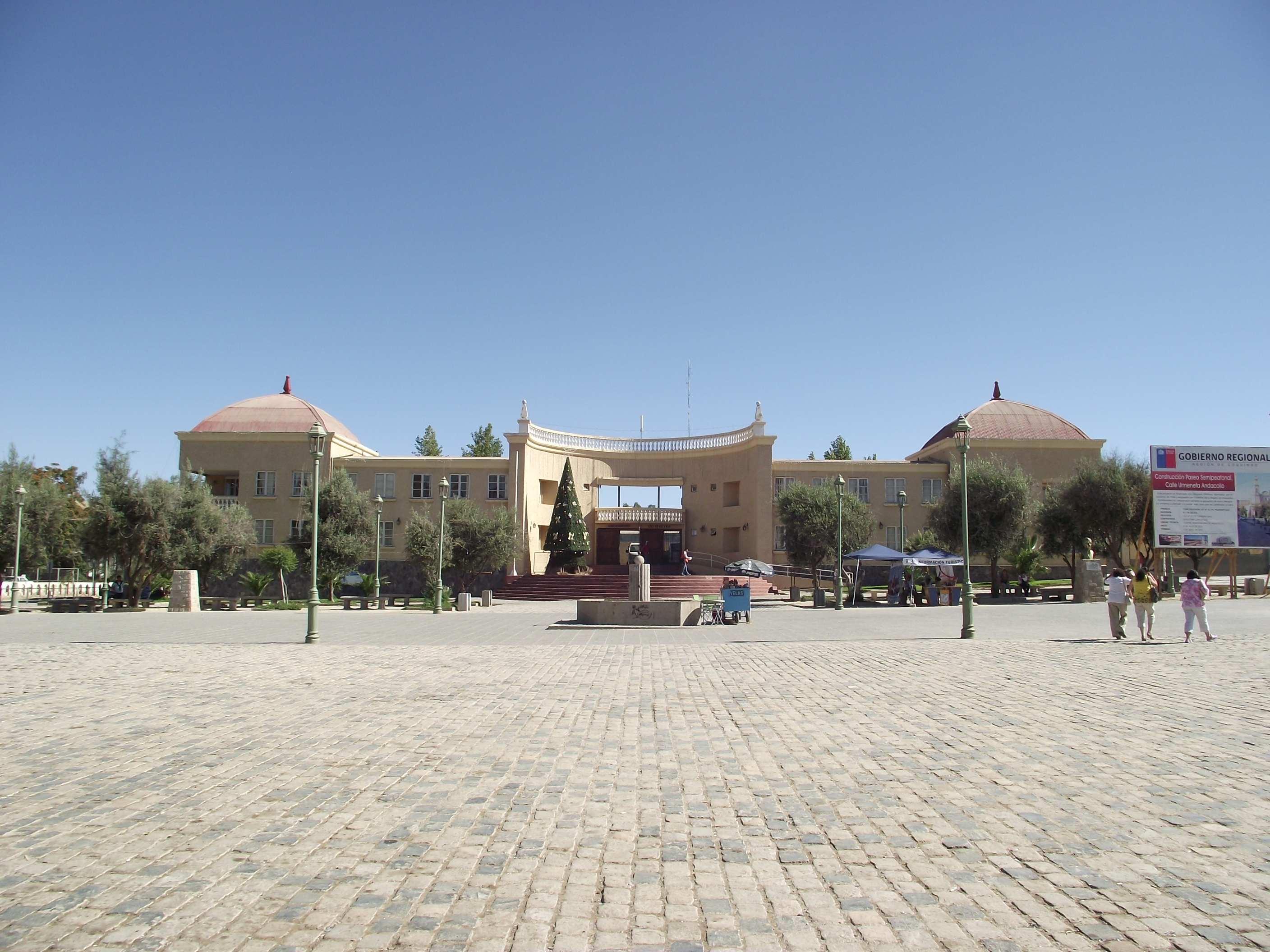 Plaza de Armas de Andacollo con el edificio de la Municipalidad al fondo.